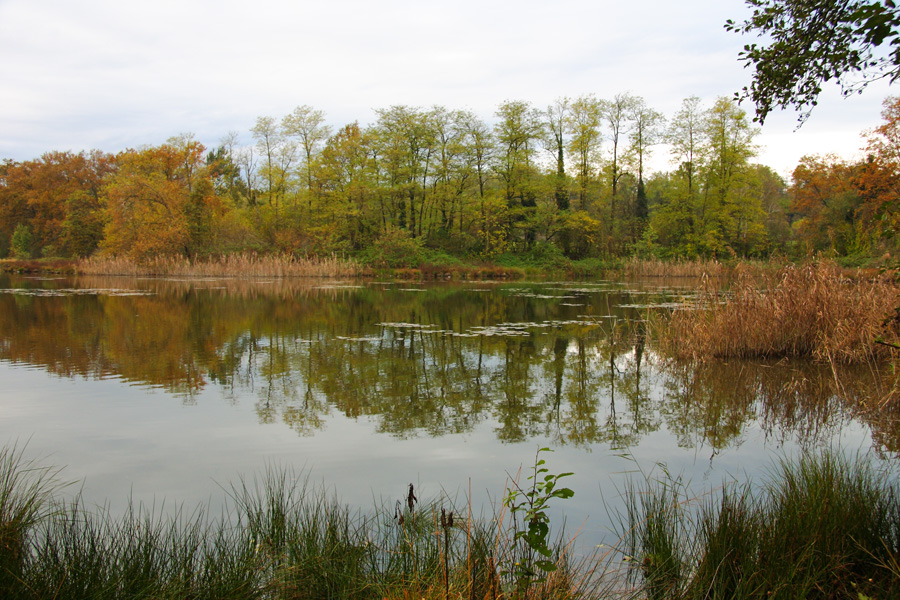 Parco naturale dei Lagoni di Mercurago, Arona (NO), scorcio del lago più grande